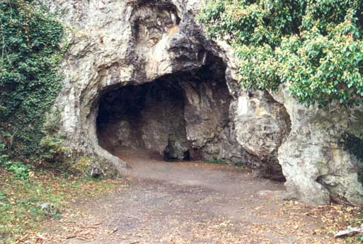 De grot nabij het Belgische plaatsje Spy waar in 1886 Neanderthaler fossielen gevonden werden. Foto door mijzelf genomen in 2004, beschikbaar gesteld onder GFDL.